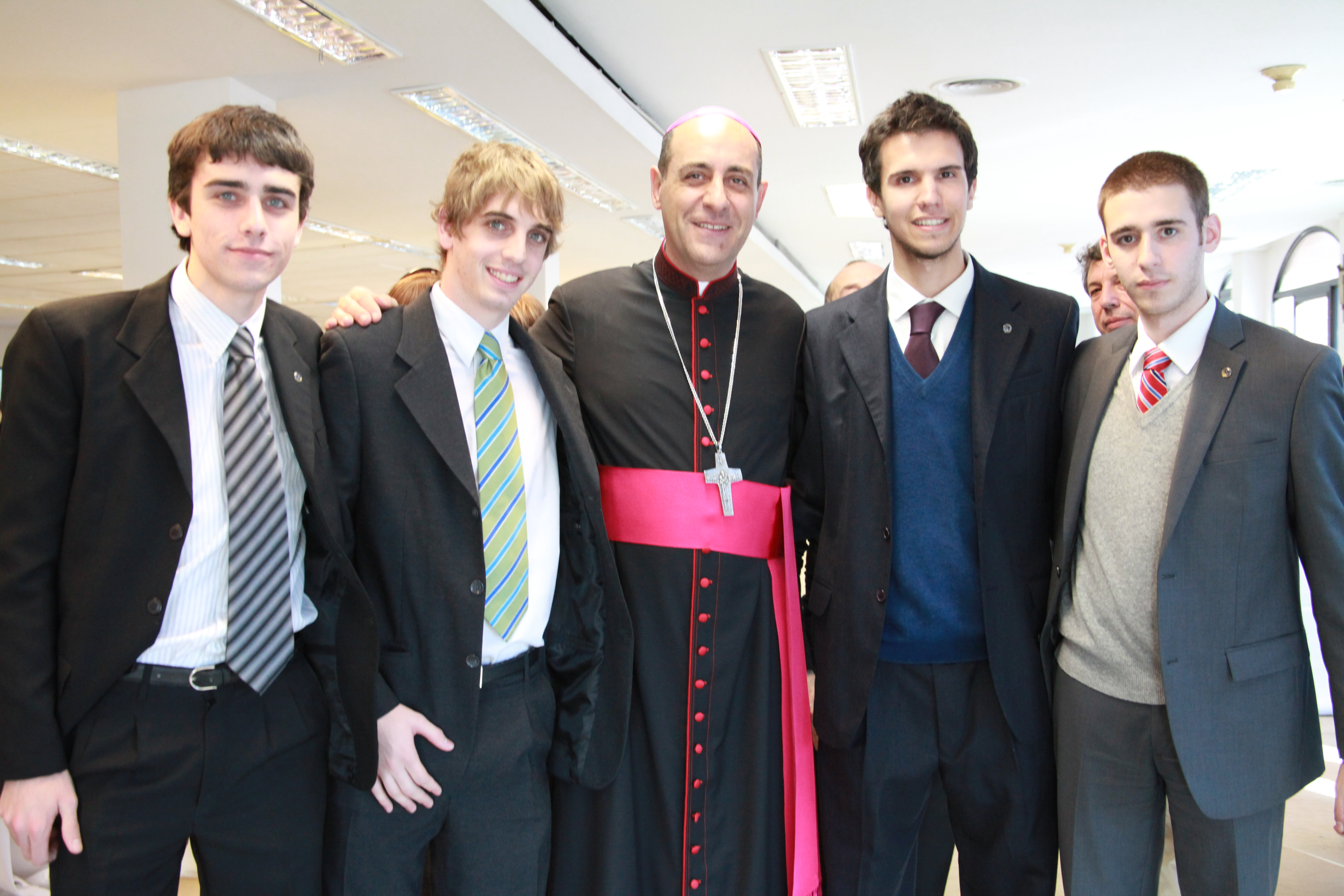 Autoridades de la Federación de Estudiantes de la UCA junto al Rector Mons. Víctor Manuel Fernández en la celebración de su ordenación episcopal.